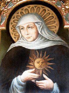 Obraz bł. Juty z Chełmży na stronie gm. Chełmża.